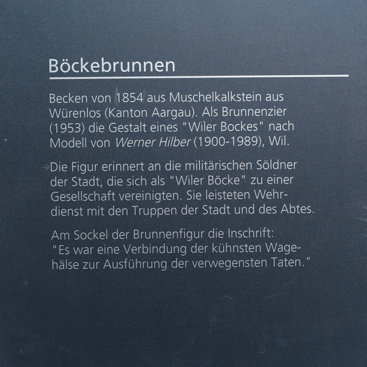 Infotafel. Böckebrunnenskulptur, 1951, von Werner Hilber (1900-1989) Bildhauer